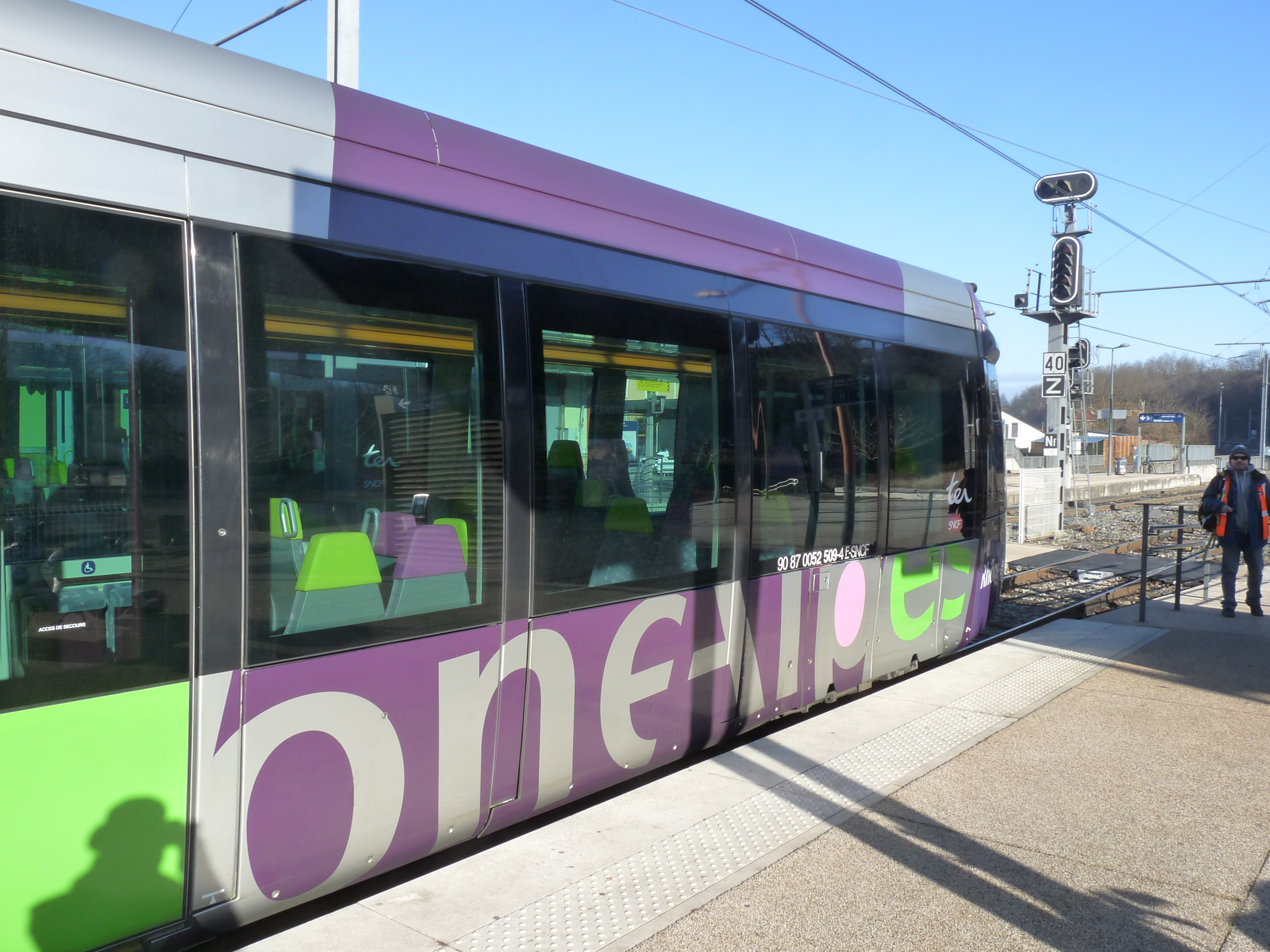 Station L'Arbresle